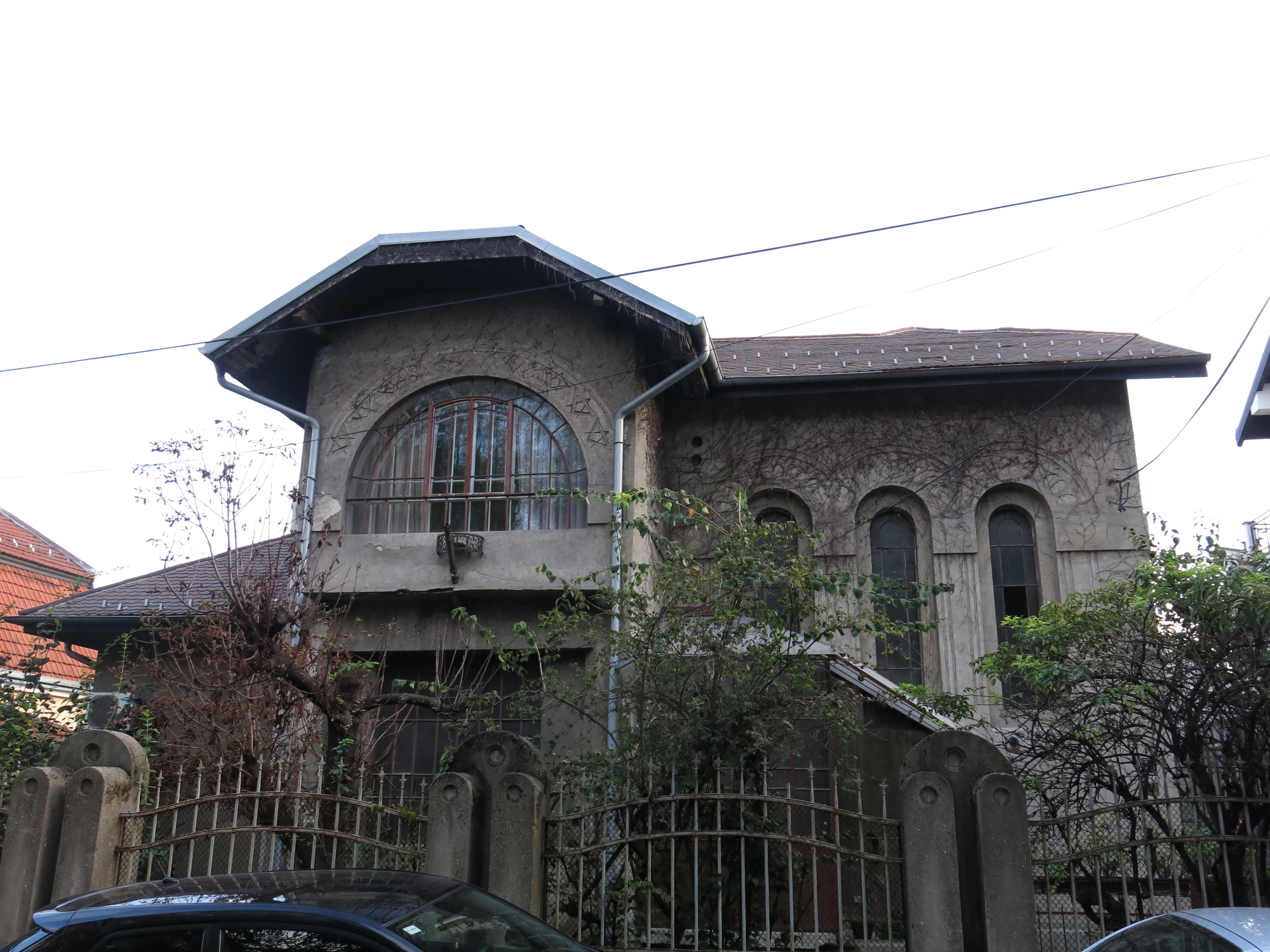 Кућа архитекте Момира Коруновића